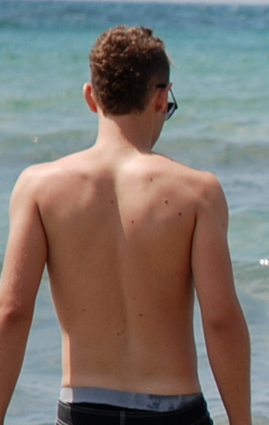 גב